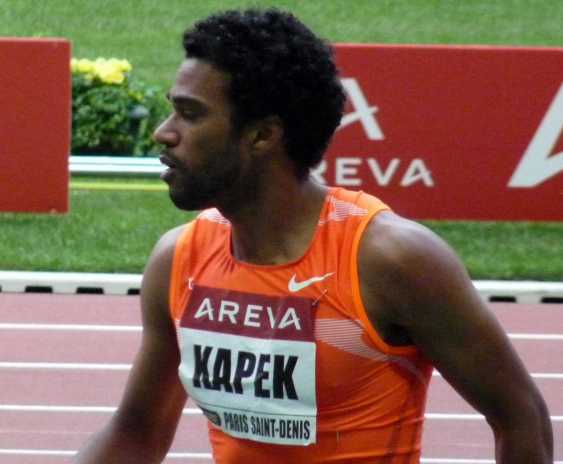 Julien Kapek lors du Meeting Areva 2009